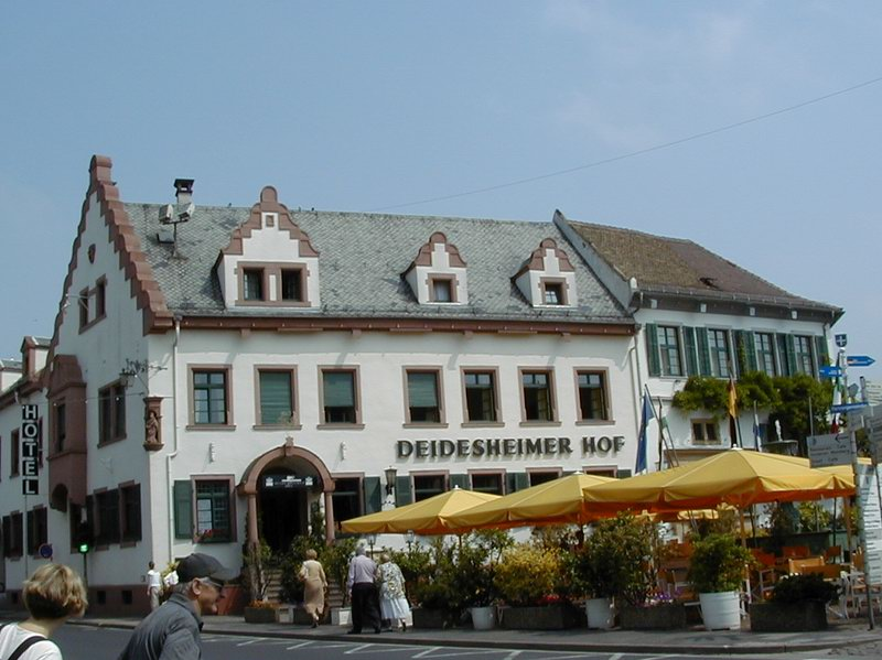 Das Hotel Deidesheimer Hof in Deidesheim (Landkreis Bad Dürkheim